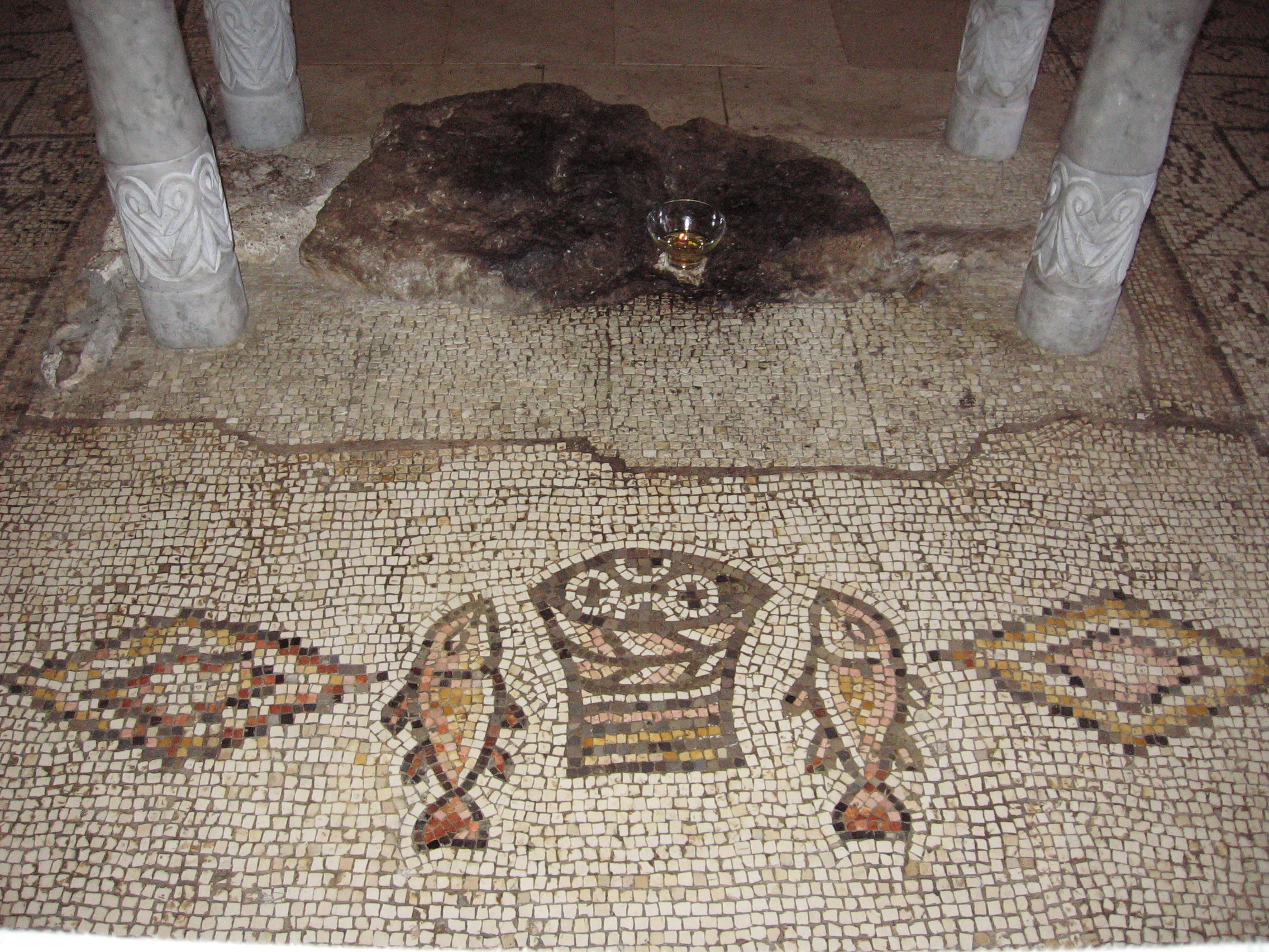 Tabga: chiesa della moltiplicazione dei pani.